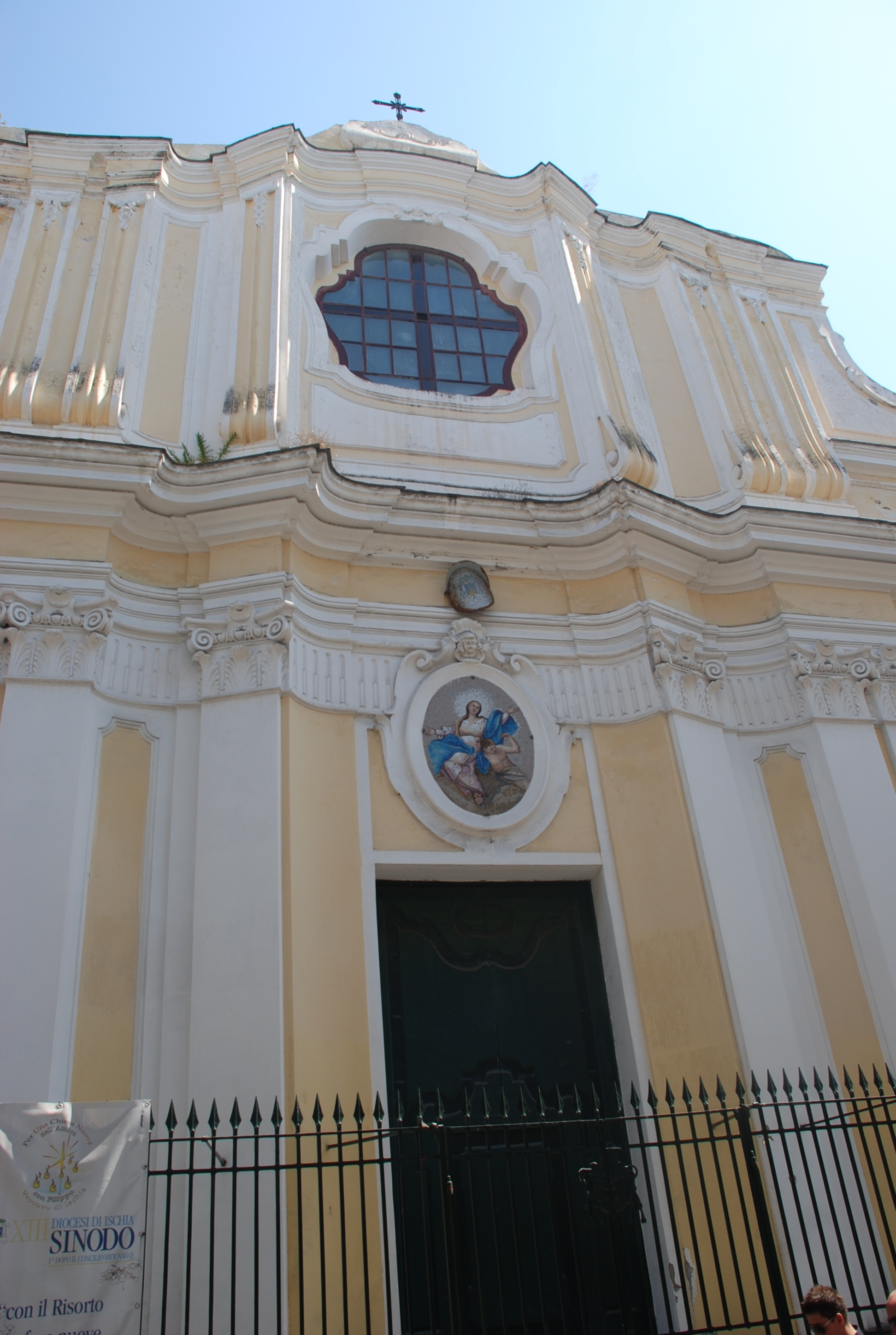 Facciata della cattedrale dell'Assunta a Ischia ponte